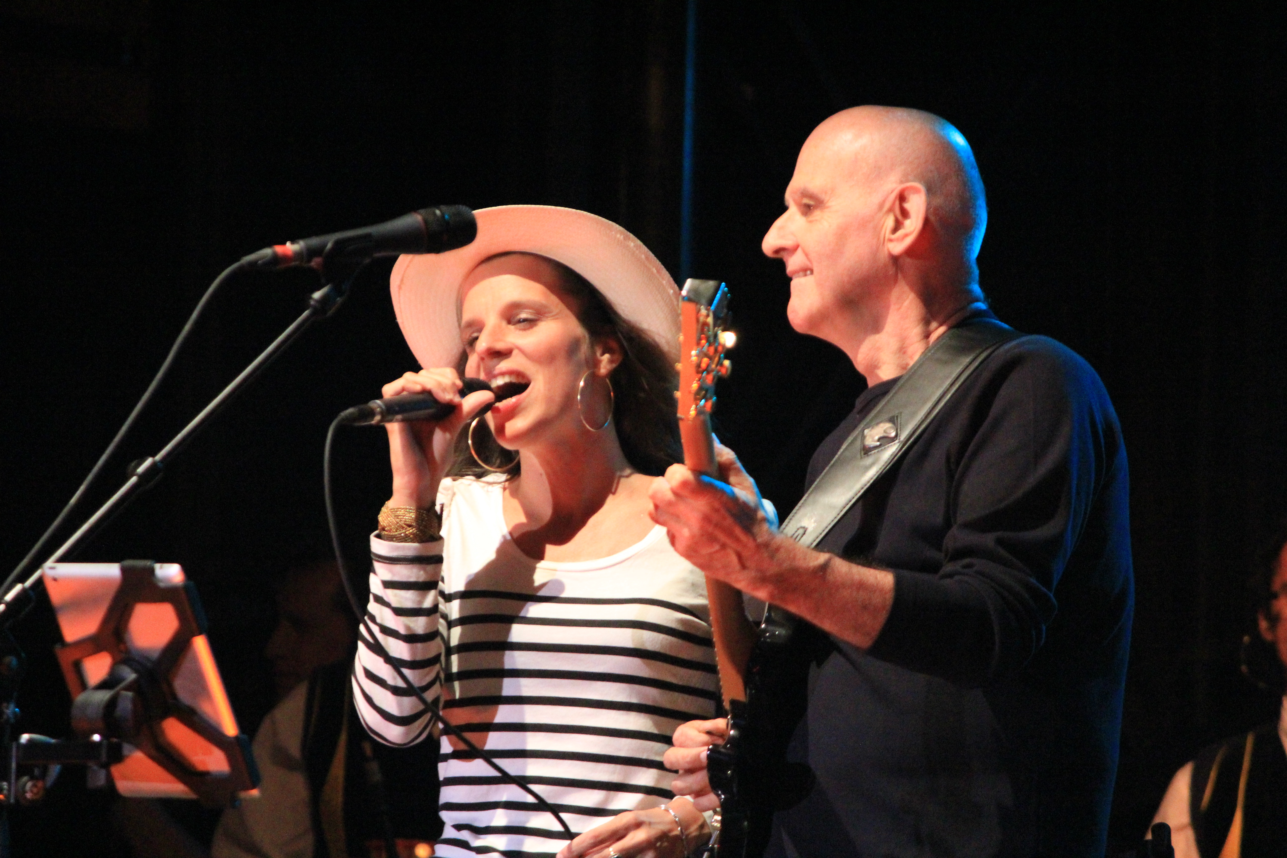 Dan Ar Braz et Clarisse Lavanant lors du concert inaugural de la tournée liée à la promotion de l'album Celebration, lors du Festival Interceltique de Lorient 2012.